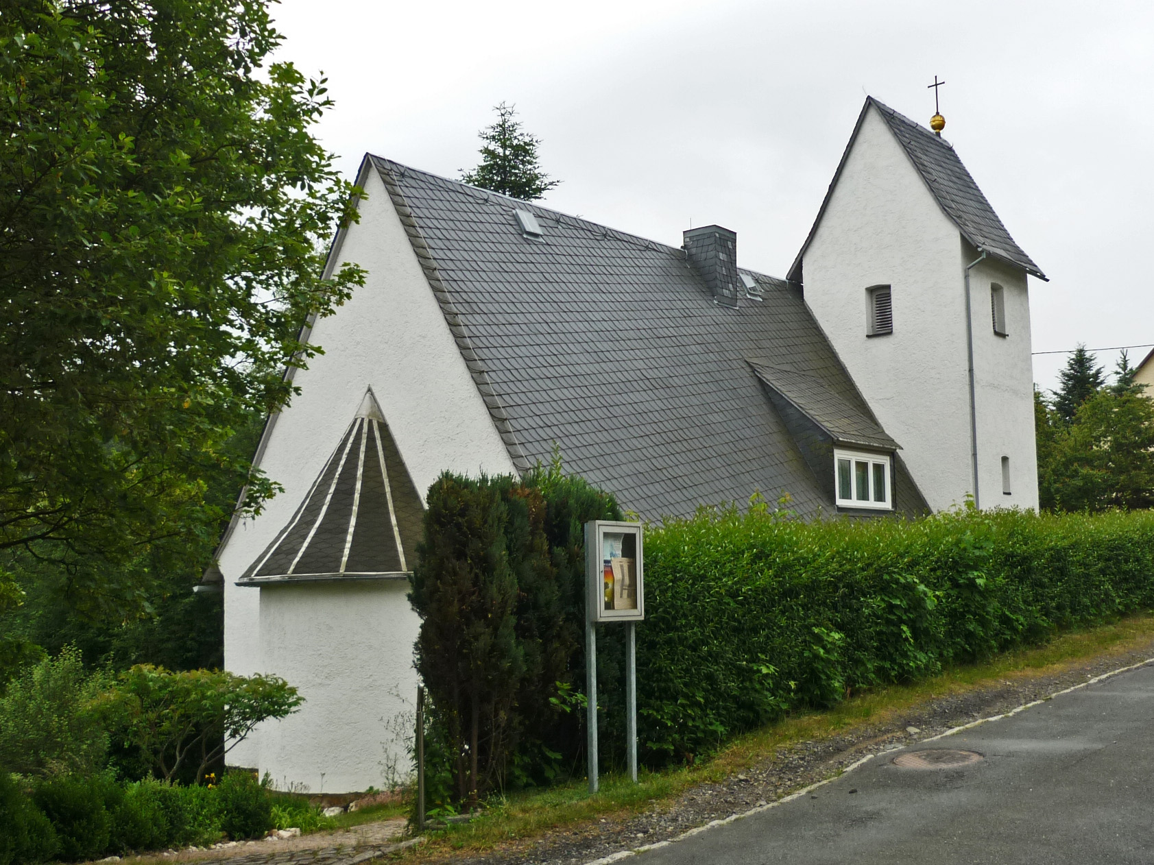 Evangelische Kirche in Piesau